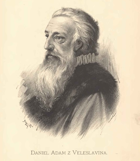 Portréty českých osobností od Jana Vilímka